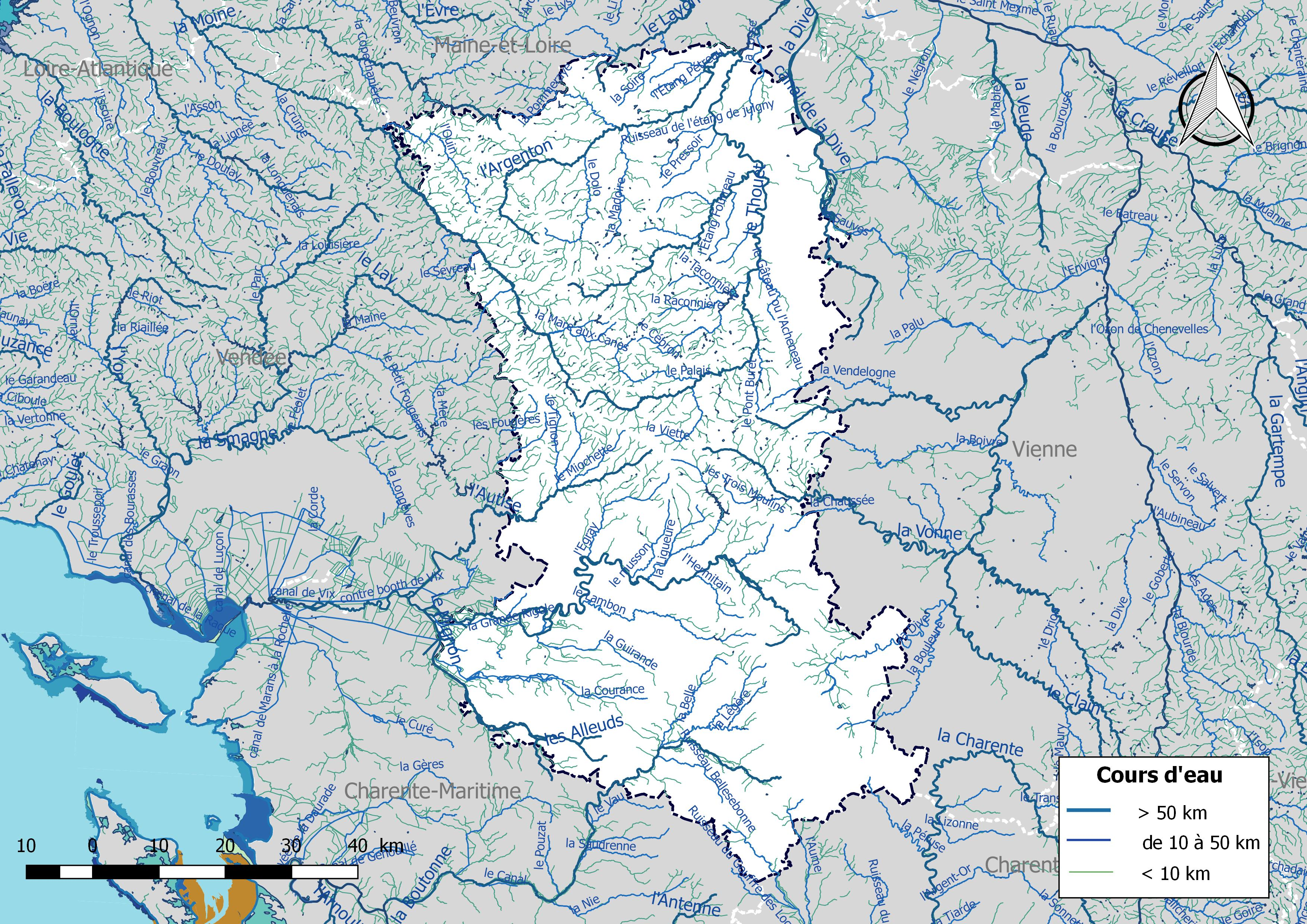 Réseau hydrographique du département des Deux-Sèvres (France).